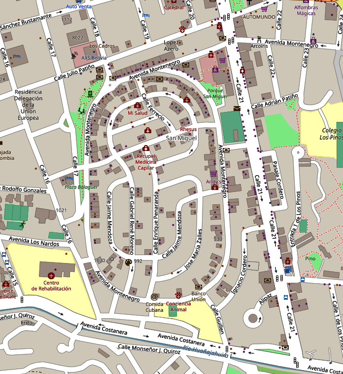 Mapa de la zona de San Miguel en La Paz, tomada de OpenStreetMal en enero de 2019